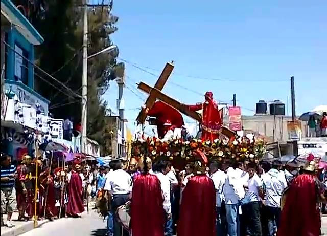 Tlaxcoapan, Hgo.